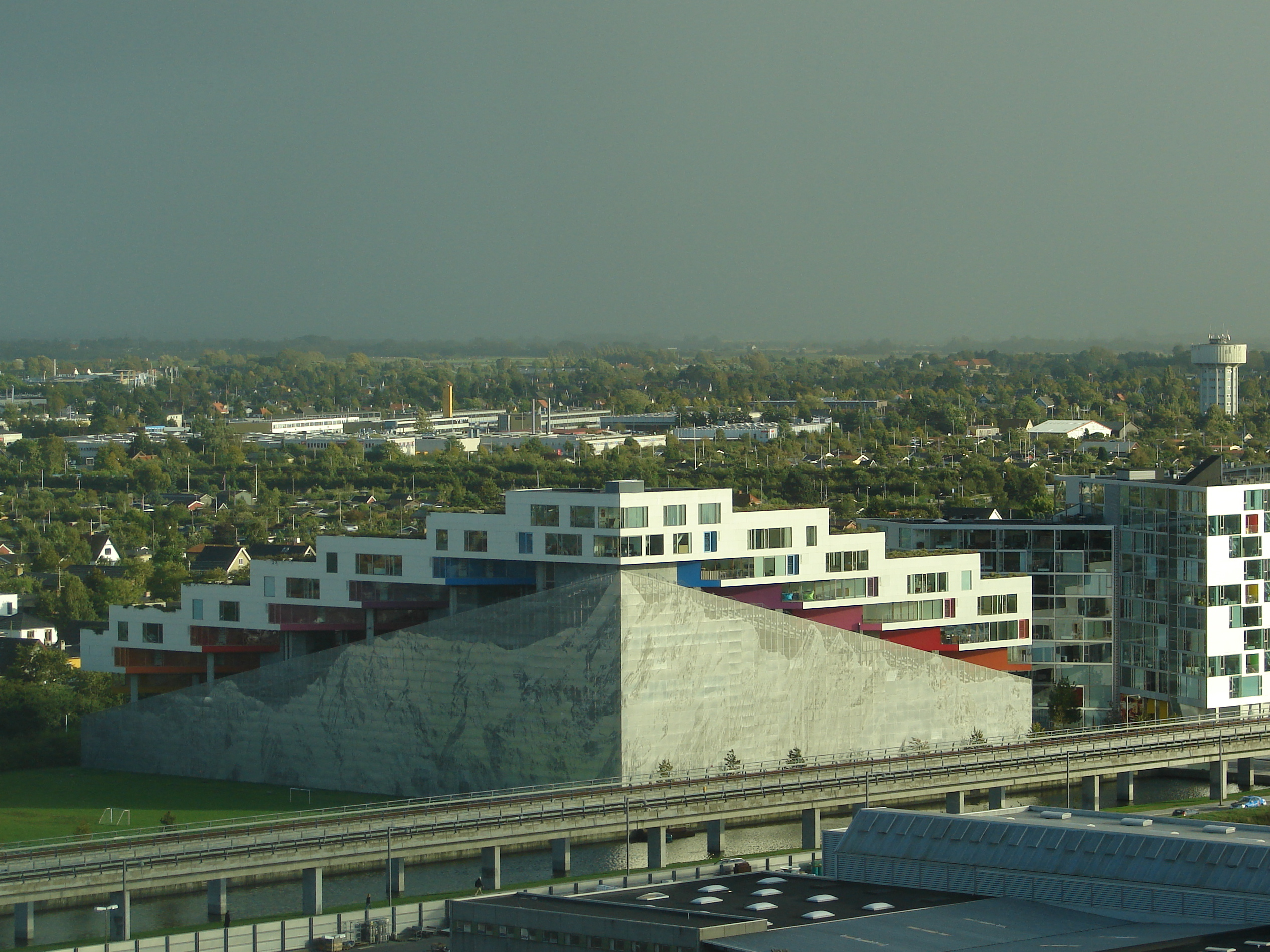 VM Bjerget af BIG, Ørestad på Amager ved København